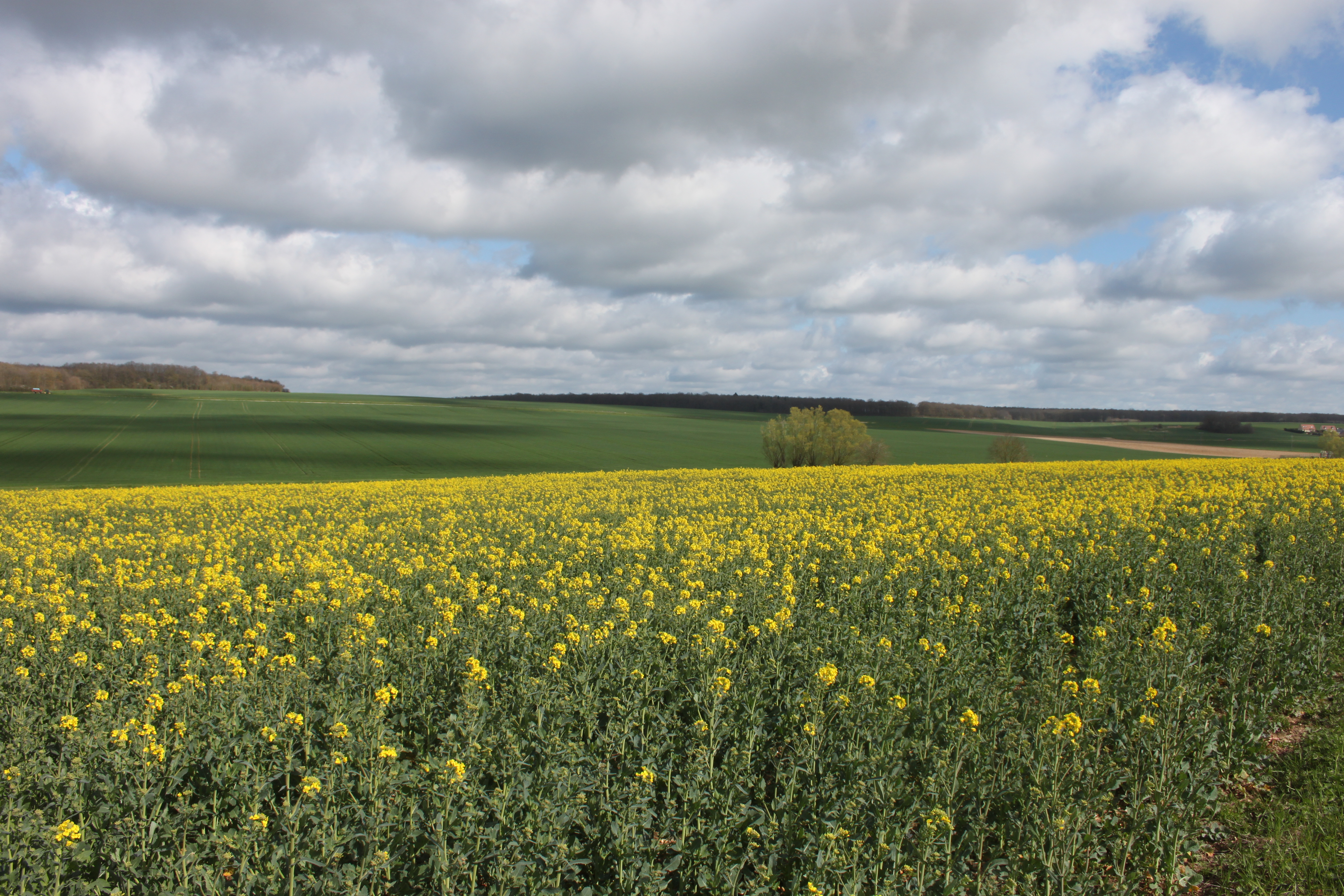 Vue sur la vallée du ruisseau du Gas (sur la D329-4 reliant Yermenonville à Gas)